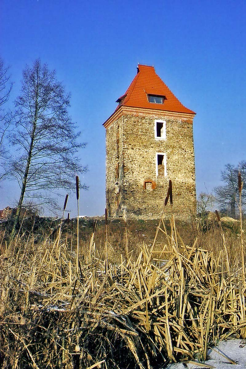 Dzietrzychowice - wieża mieszkalna.